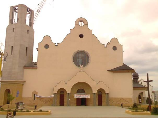 Kościół p.w. Miłosierdzia Bożego w Głogowie - ściana frontowa